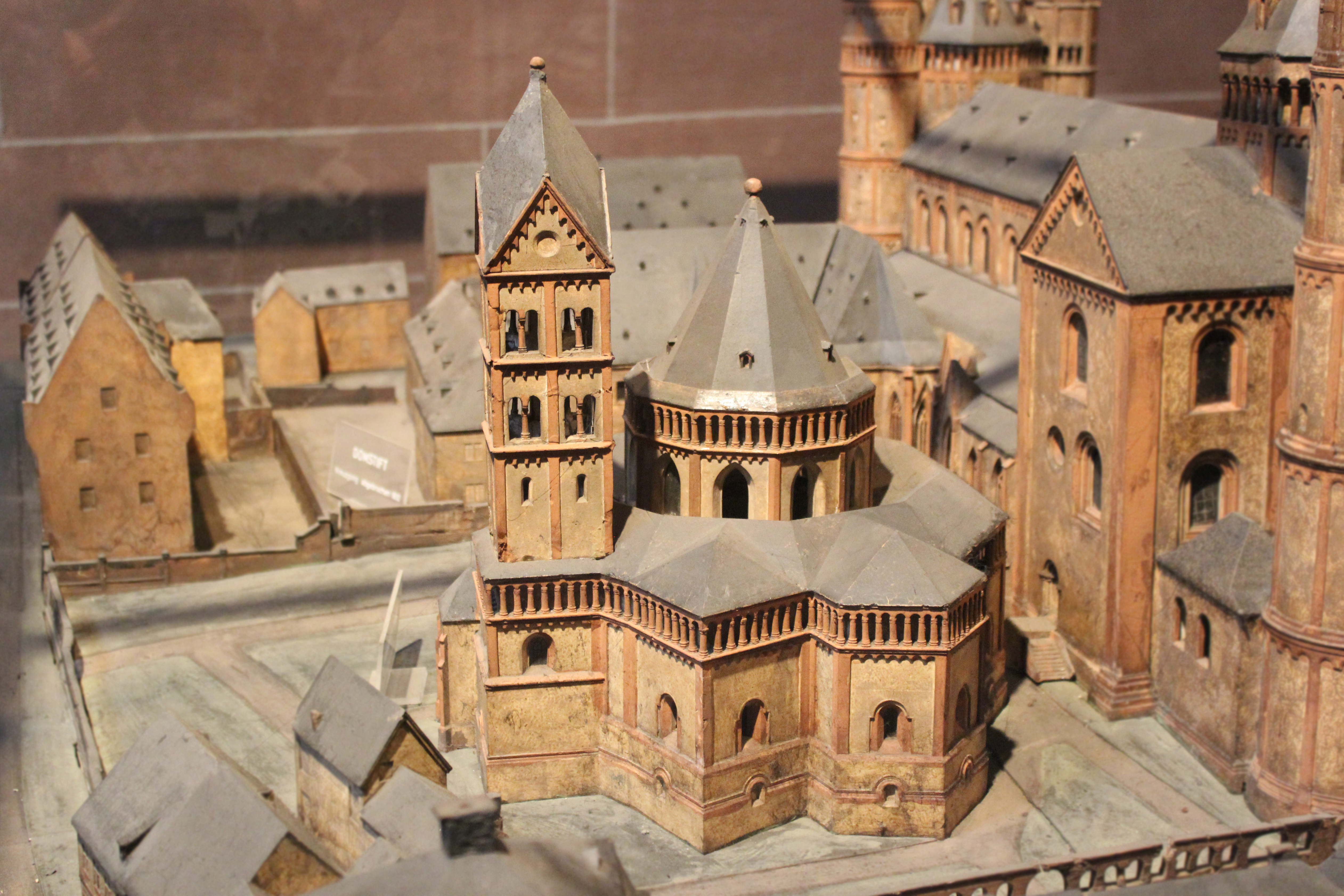 Modell der Johanneskirche (Worms) Choranlage